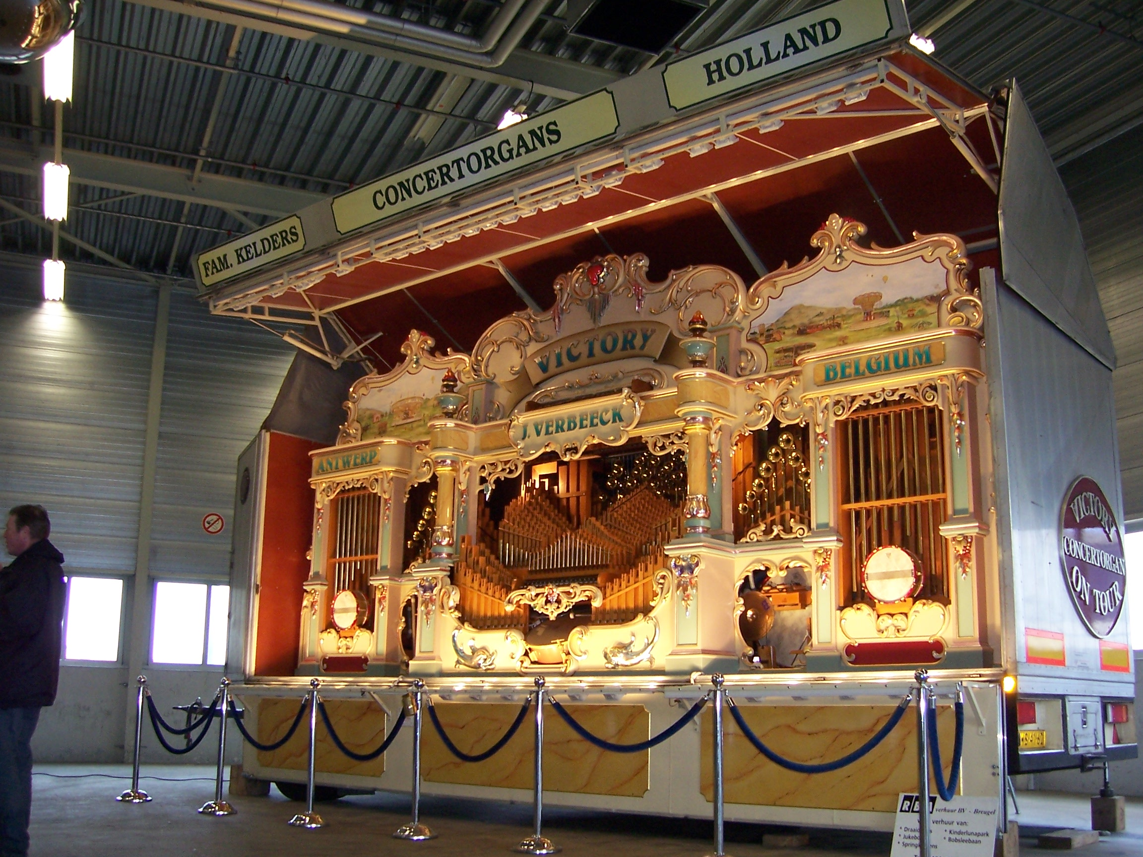 De Victory tijdens de Familiedag in de DAF-Fabriek te Eindhoven. Foto zelf gemaakt en onder andere gepubliceerd op RBA-Verhuur.nl.